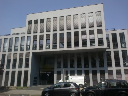 MHG Bonn